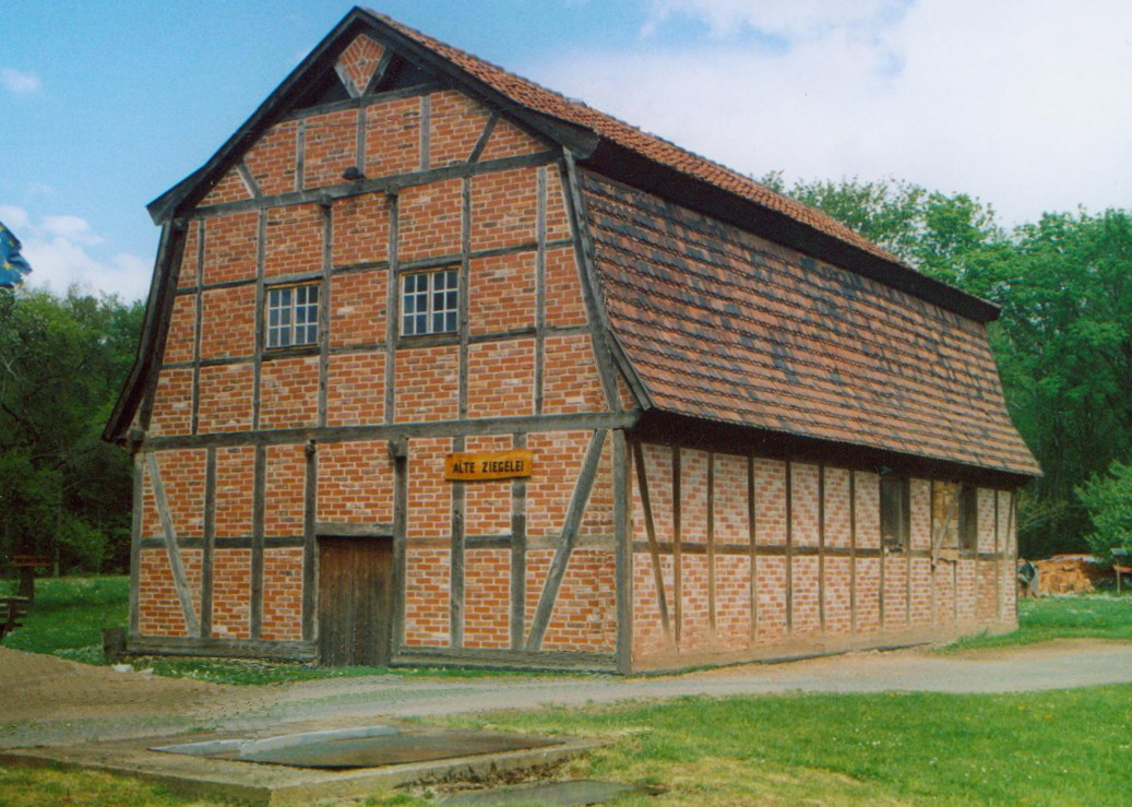 Degenershausen - ehemaliges Ziegeleigebäude nach der Restaurierung